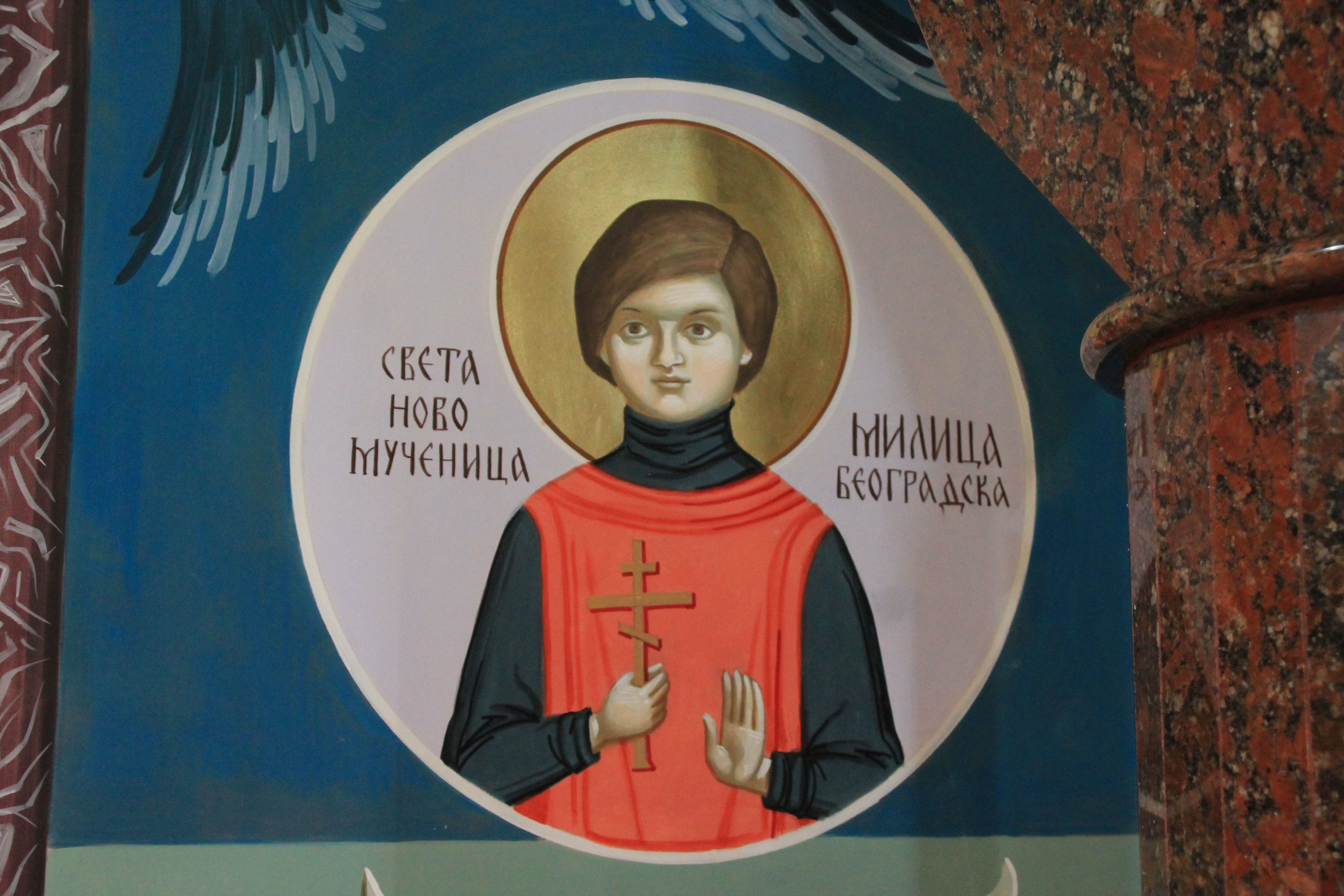 Manastir Tresije